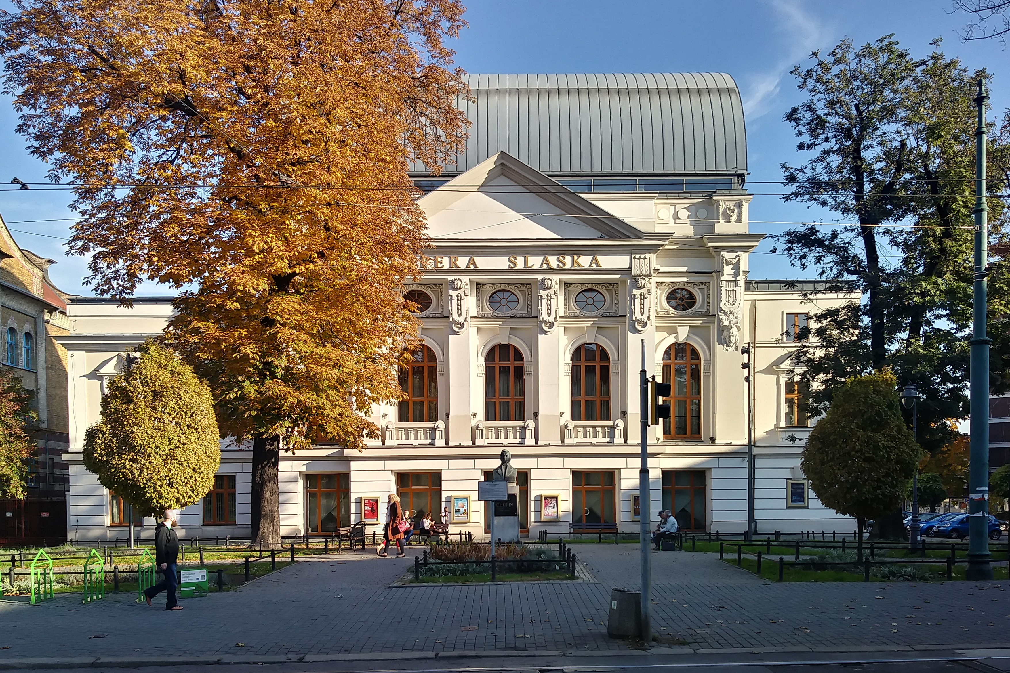 fasada Opery Śląskiej, widok z Placu gen. Władysława Sikorskiego, z lewej fragment budynku IV liceum ogólnokształcągego, przed Operą pomnik Fryderyka Chopina